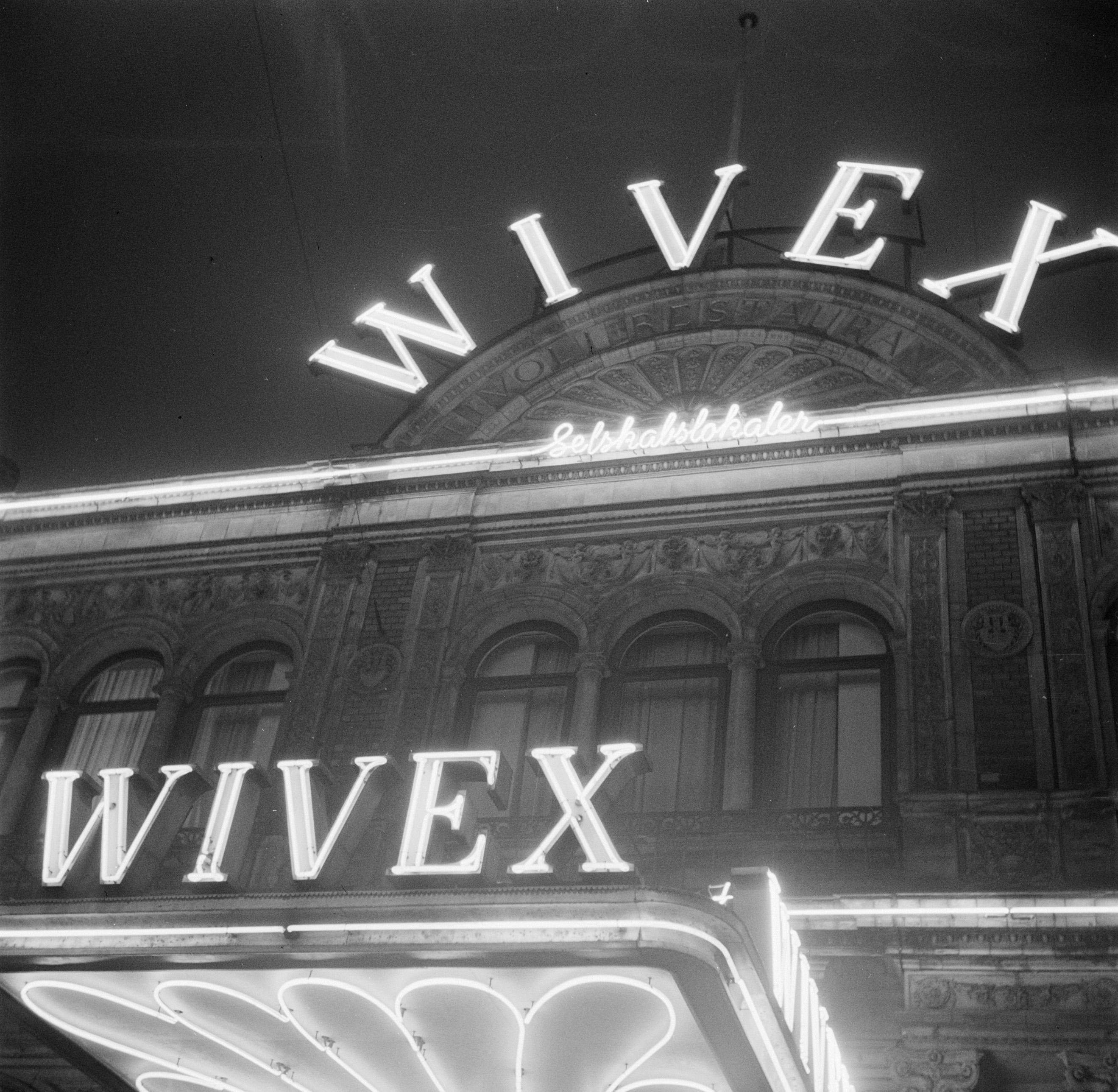 Collectie / Archief : Fotocollectie Van de Poll Reportage / Serie : Restaurant Wivex gevestigd in het facadegebouw van park Tivoli Beschrijving : Neonreclame aan het gebouw van restaurant Wivex Datum : maart 1954 Locatie : Denemarken, Kopenhagen Trefwoorden : avond, lampen, reclame, restaurants, verlichting Instellingsnaam : Wivex Fotograaf : Poll, Willem van de, [onbekend] Auteursrechthebbende : Nationaal Archief Materiaalsoort : Negatief (zwart/wit) Nummer archiefinventaris : bekijk toegang 2.24.14.02 Bestanddeelnummer : 252-9135